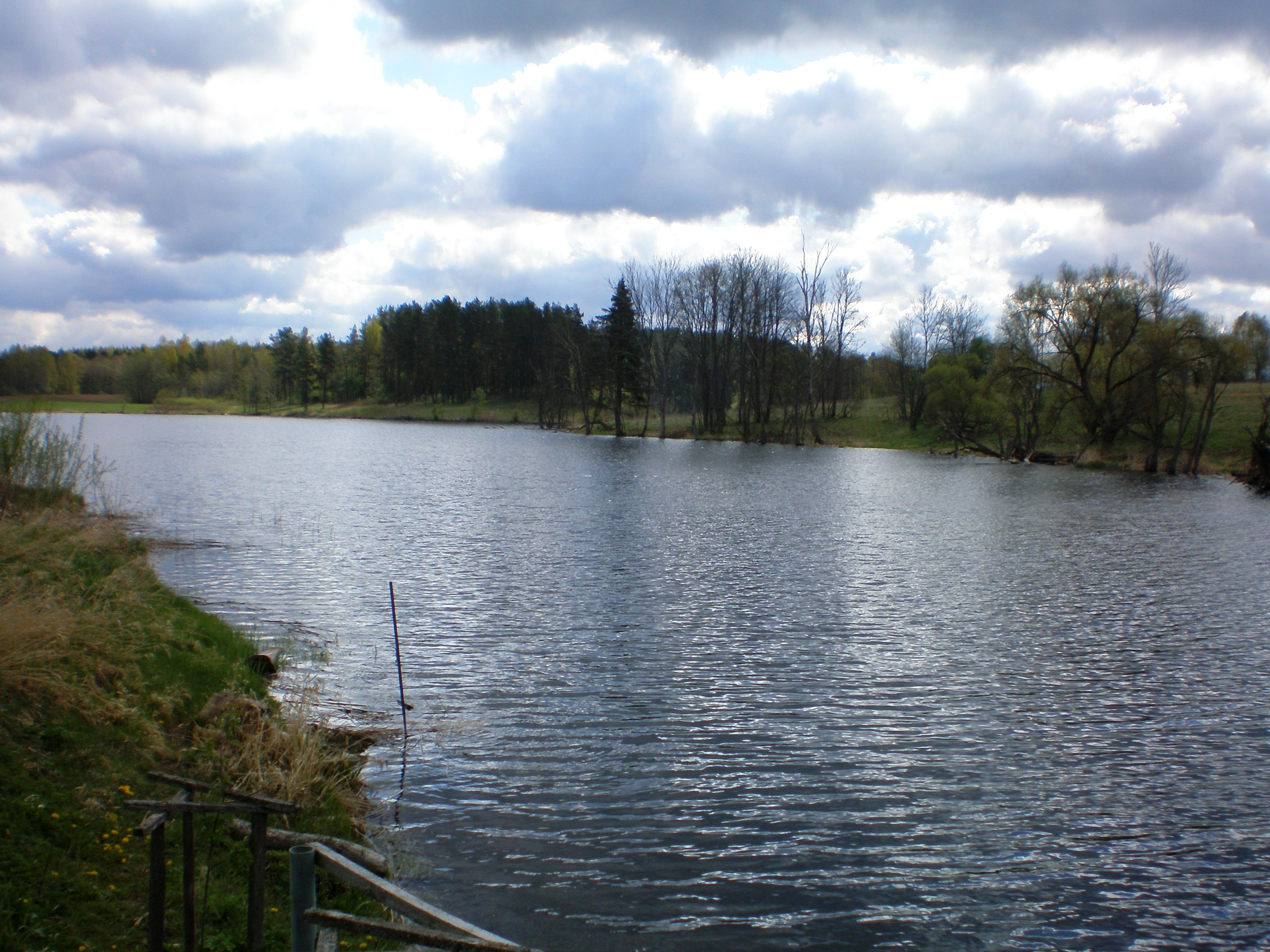 Svobiškio He tvenkinys ant Virintos, Molėtų raj. 2007.05.05 Foto: Hugo.arg